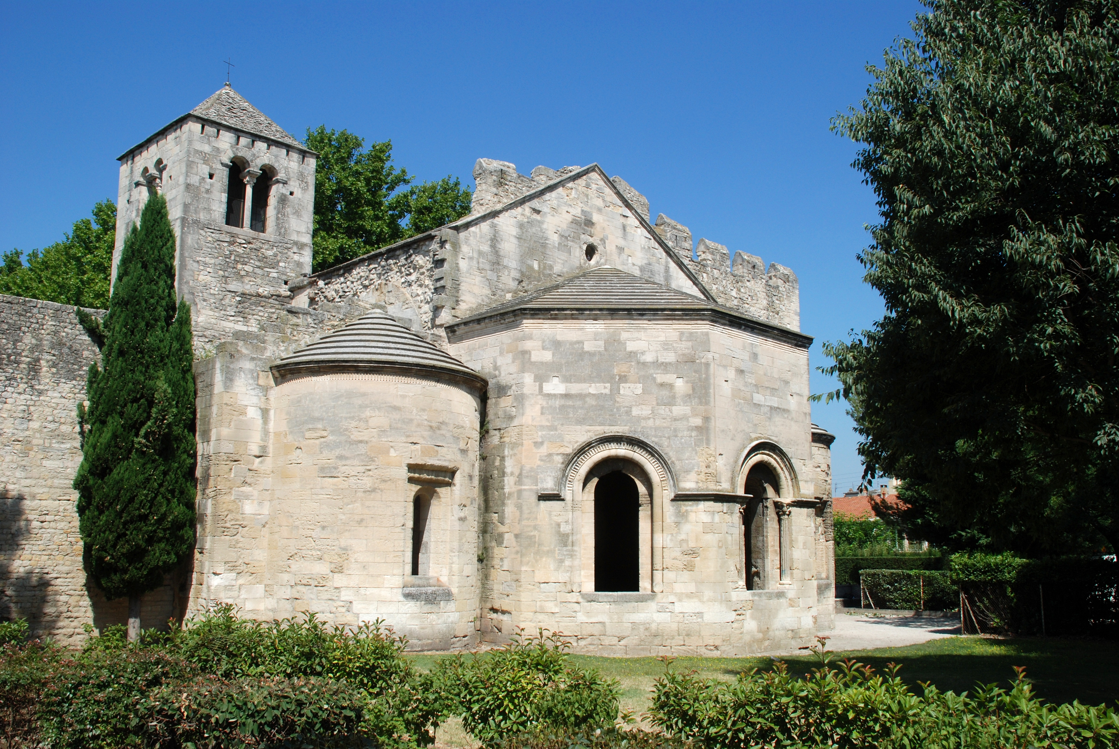 France - Provence - Avignon - Abbaye Saint-Ruf